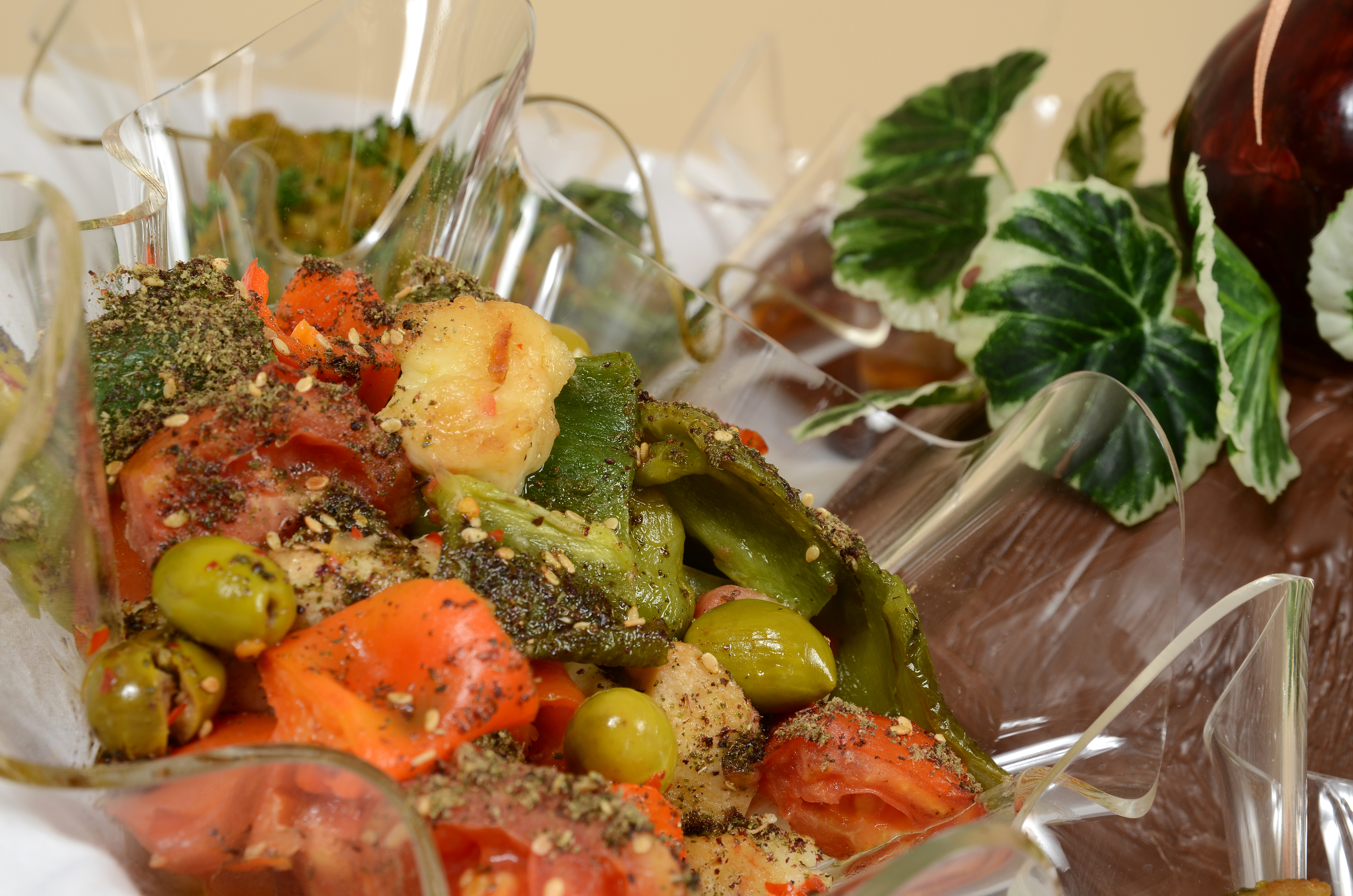 حمسة آو حمصة خضروات وهو طبق من المطبخ الكويتي يتكون من خضروات يتم تحميسها (قلي سريع) في الزيت مع إضافة بعض البهارات